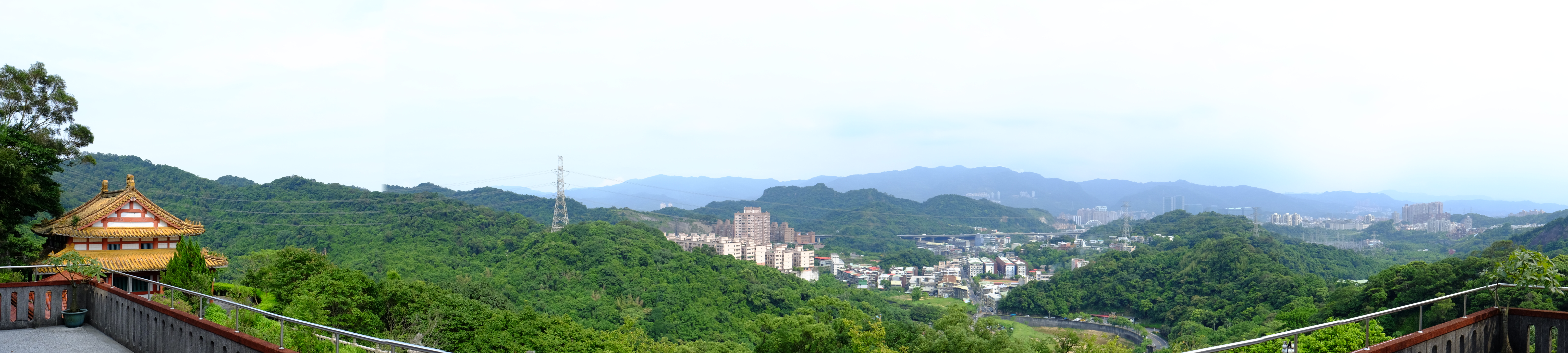 拱北殿展望